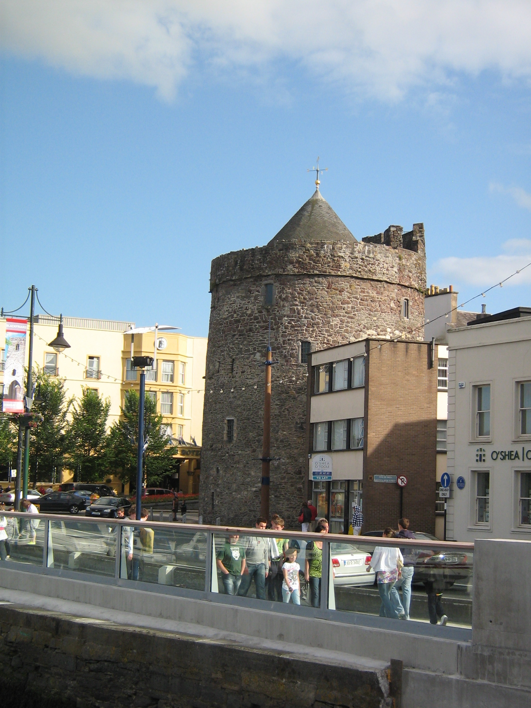 Einer der Befestigungstürme der Wikinger in Waterford